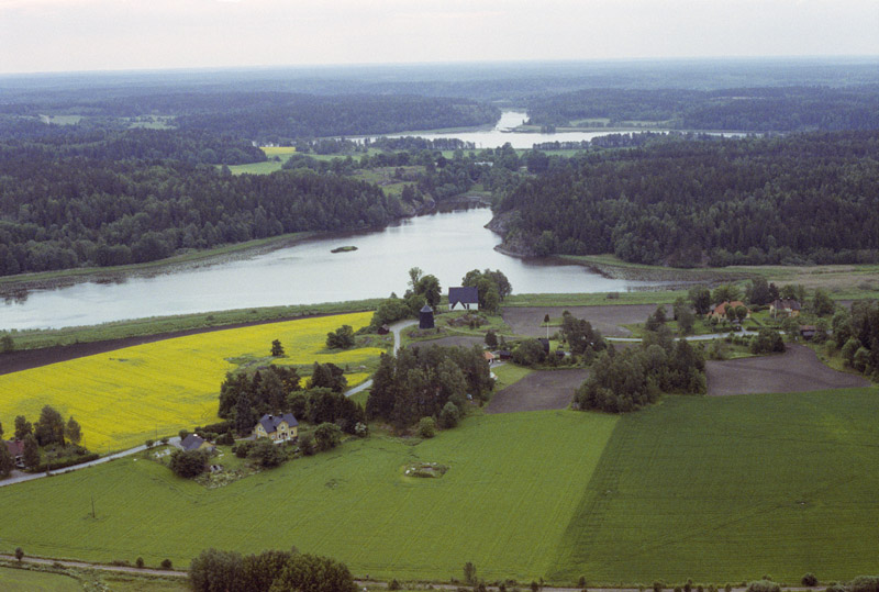 Malsta kyrka i bildens mitt, från norr. Motiv: Malsta Nyckelord: Flygbilder, Riksintressen Kategori: Insjömiljöer, Kyrkomiljö Malsta kyrka i bildens mitt, från norr.